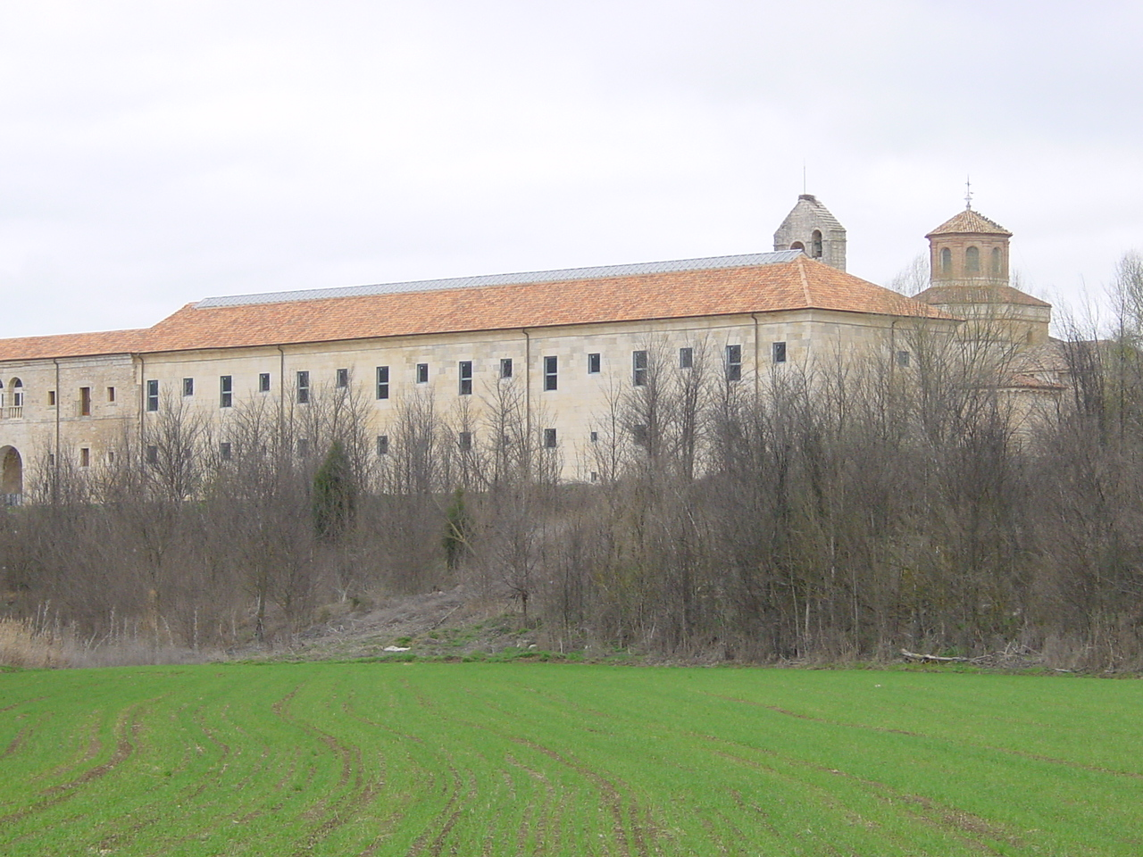 Monasterio cisterciense de Santa María de Valbuena en el término de Valbuena de Duero (Valladolid). Fachada de poniente de las dependencias del monasterio. Hospedería orientada al río Duero.